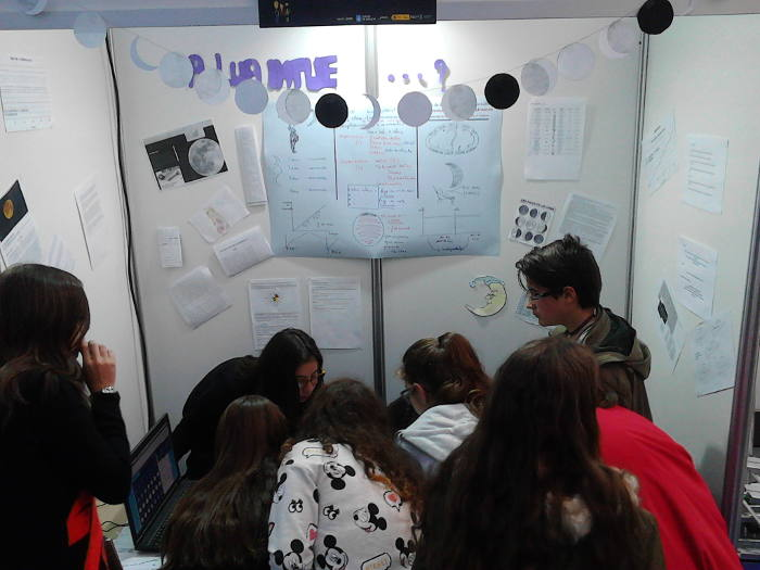 Un momento de explicación do proxecto 'Astronomía, nacemento, rendemento', na Galiciencia 2016